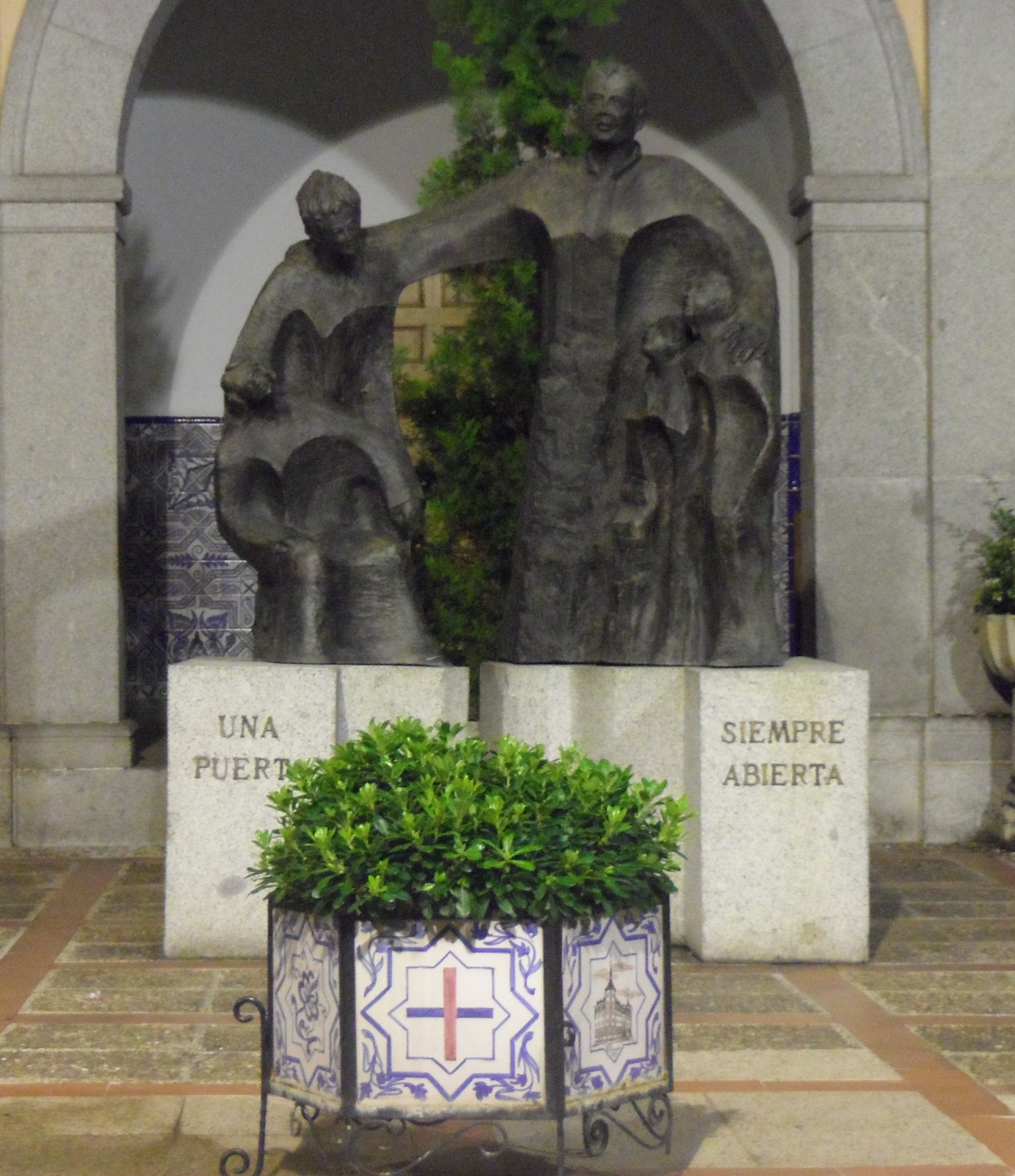 Estatua de Francisco de Asís Méndez Casariego en el patio central de la Curia General de las Hermanas Trinitarias de Madrid. Marqués de Urquijo, 18.